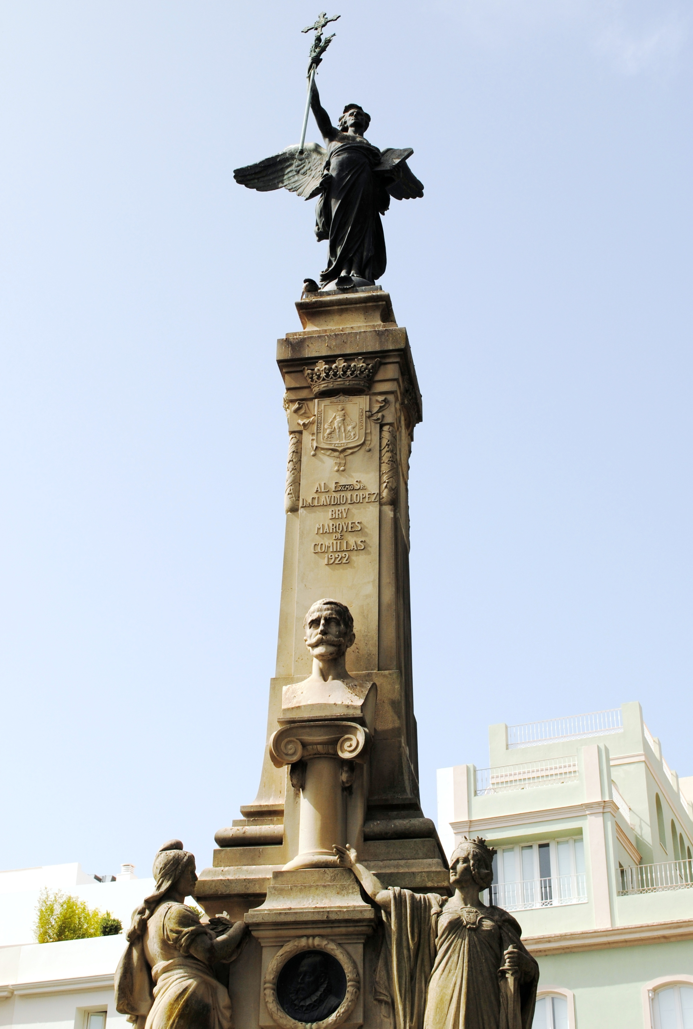 Claudio López Bru, Marqués de Comillas, Cádiz.